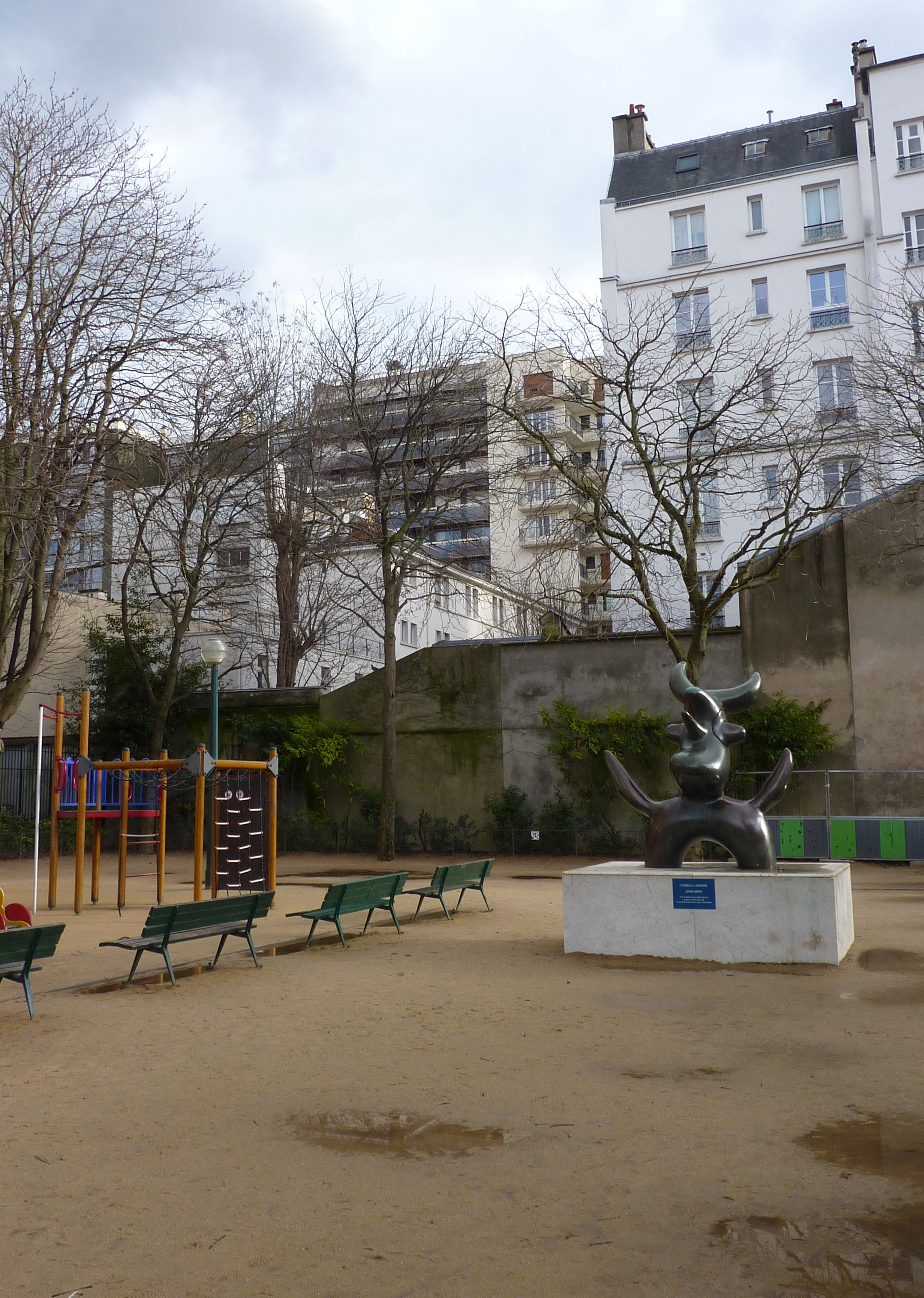 Square de l'oiseau lunaire, à l'emplacement du 45 rue Blomet, Paris (ateliers des peintres surréalistes)